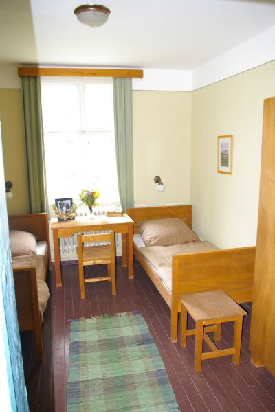 Room of Jesse Owens, Berlin 1936